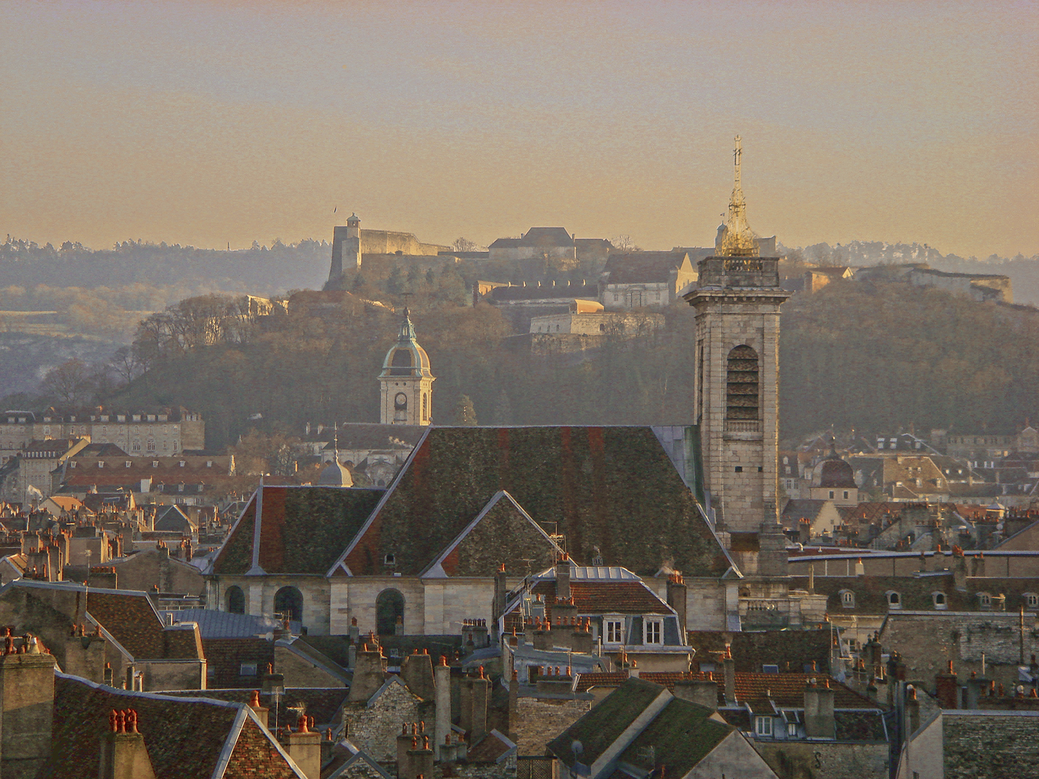 Vue de Besançon